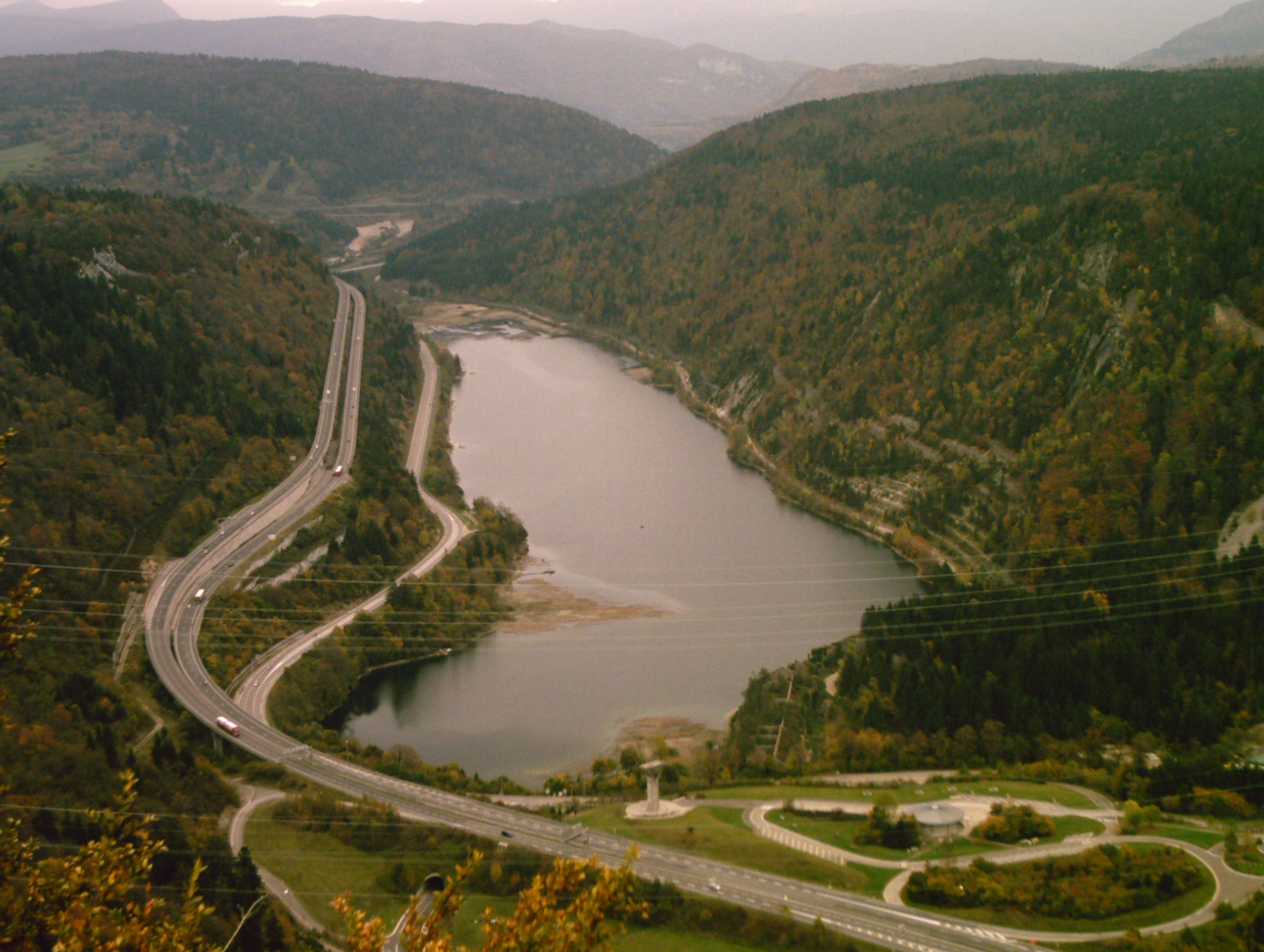 Vue du lac de Sylans depuis le point de vue du Font de Seme (918 m). L'autoroute A40 longe le lac.